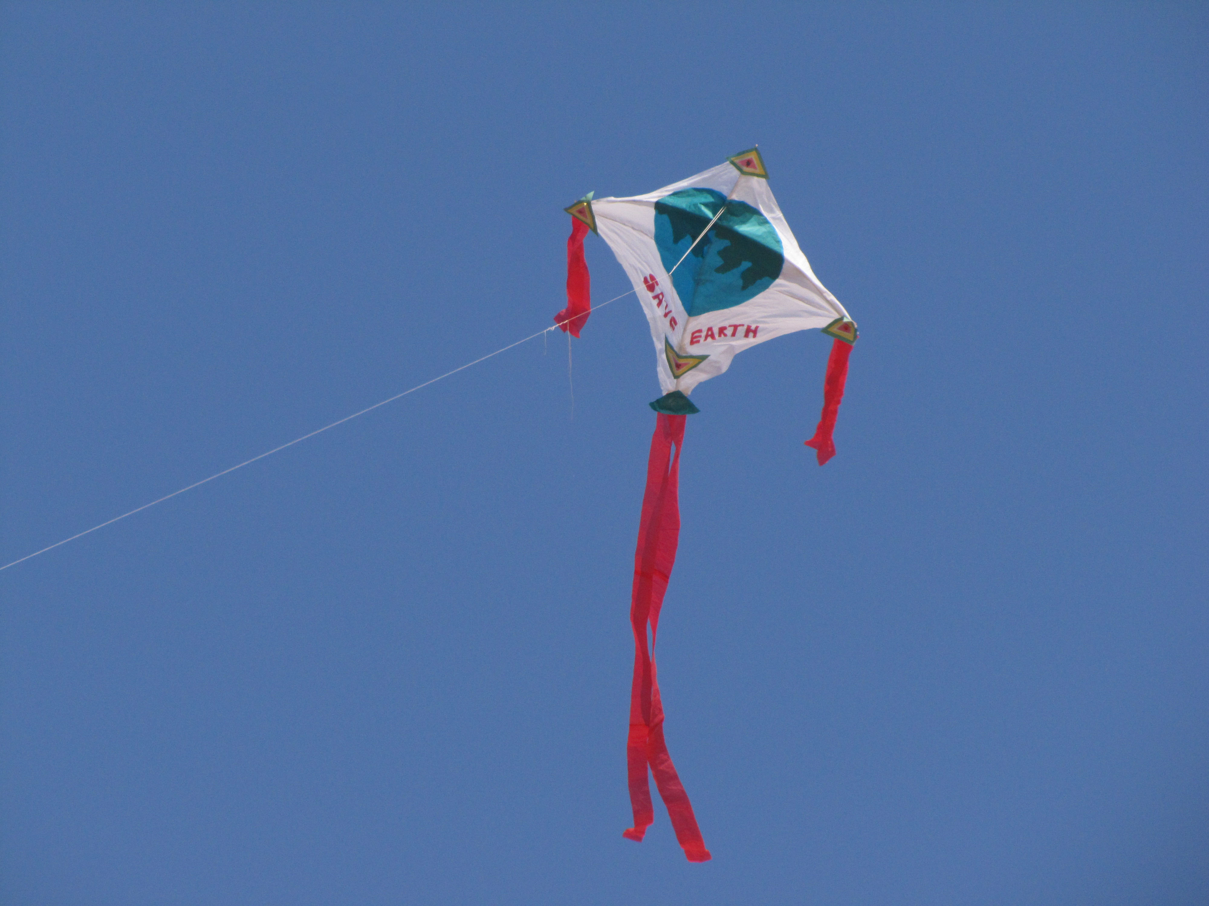 Kite at Panambur beach Mangalore